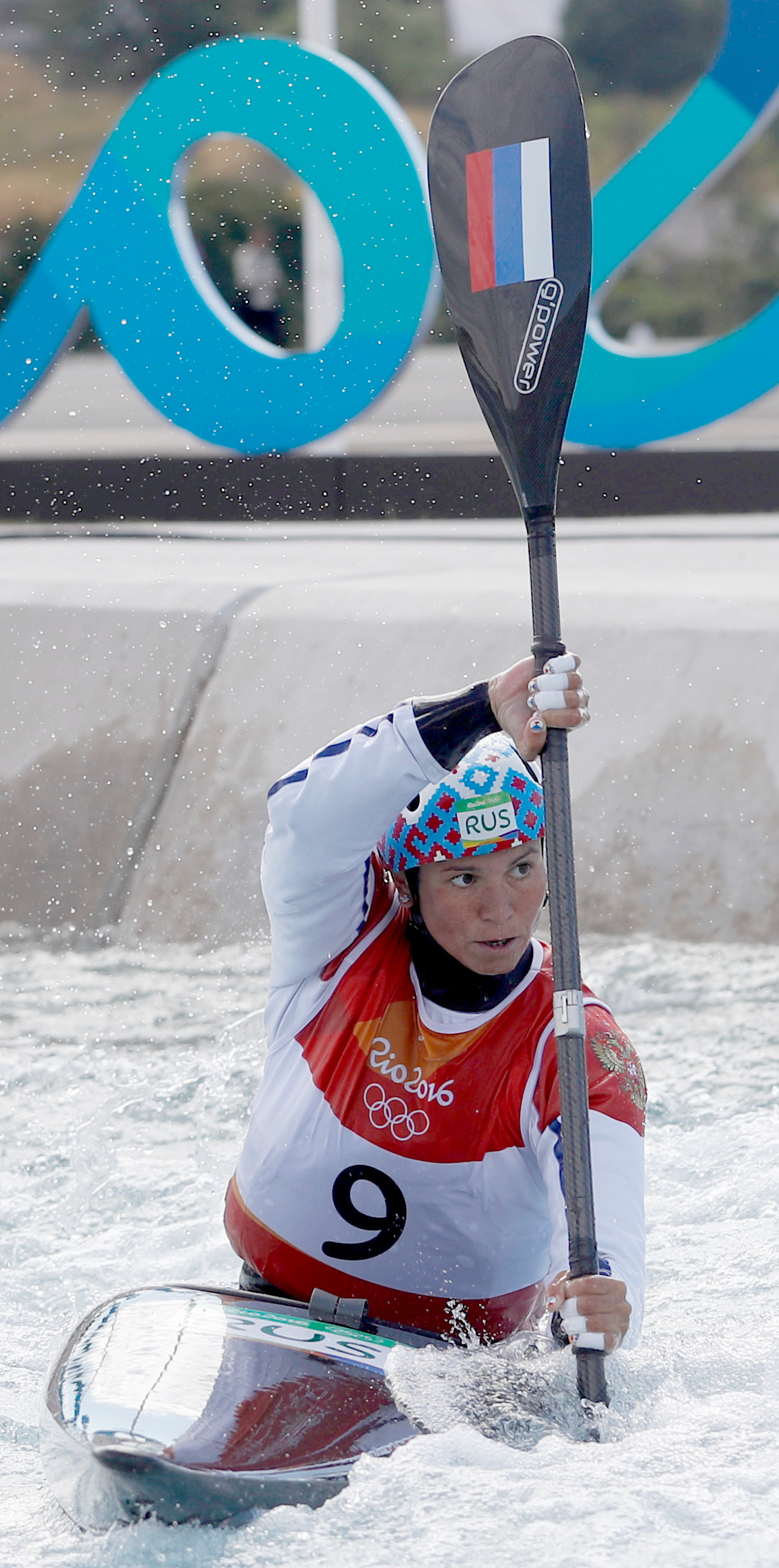 Rio de Janeiro - Marta Kharitonova disputa canoagem slalom categoria K1 nos Jogos Olímpicos Rio 2016 no X Park em Deodoro (Fernando Frazão/Agência Brasil)